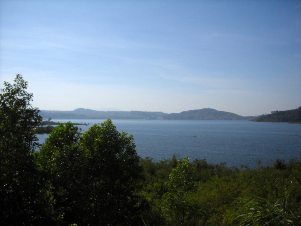 Hồ Lắk, huyện Lắk, Đắk Lắk, Việt Nam